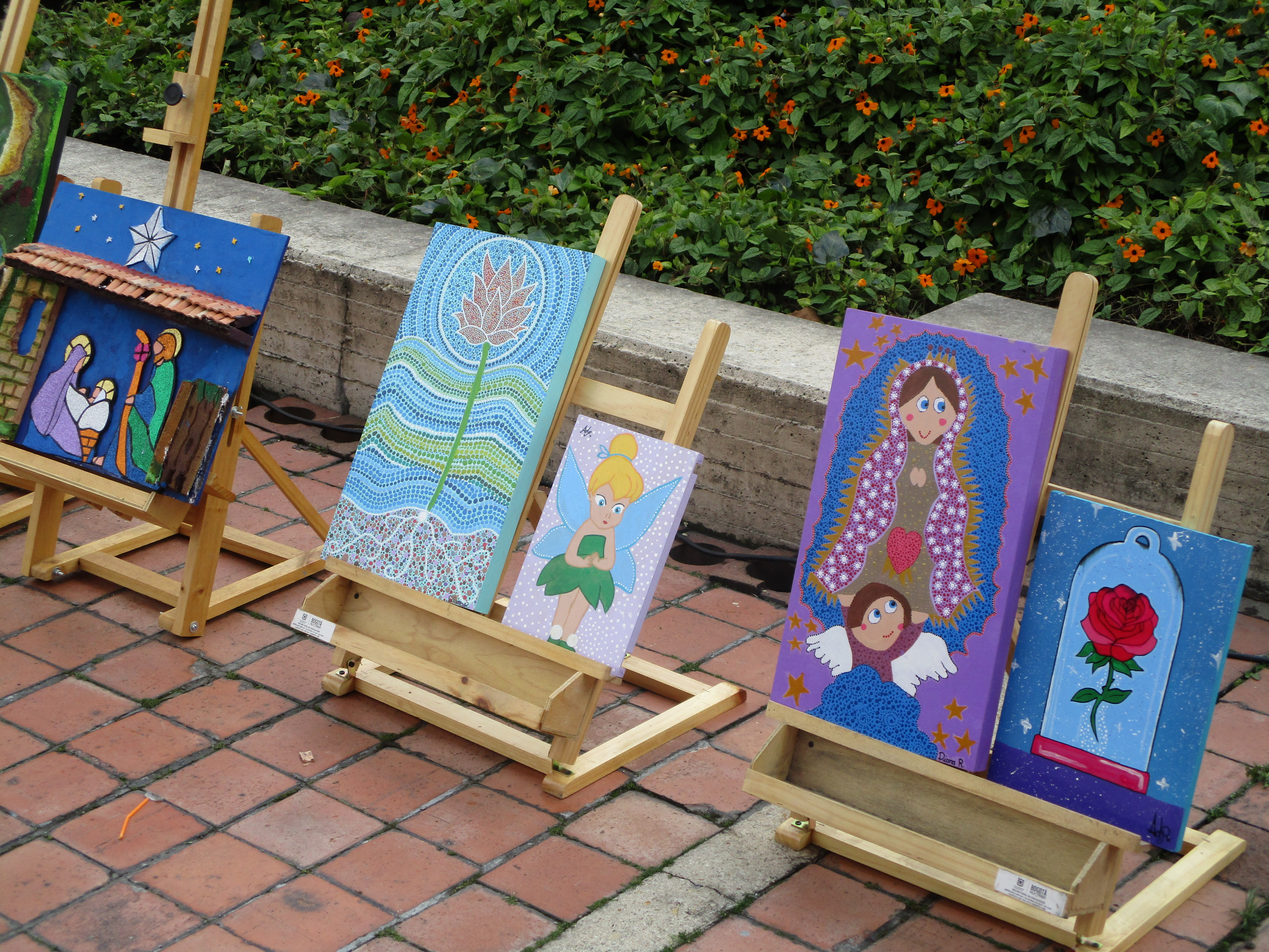 foto de los Proyectos Pedagógicos Ocupacionales de Artesanias PPO del Colegio Bolivia I.E.D Bogotá Colombia